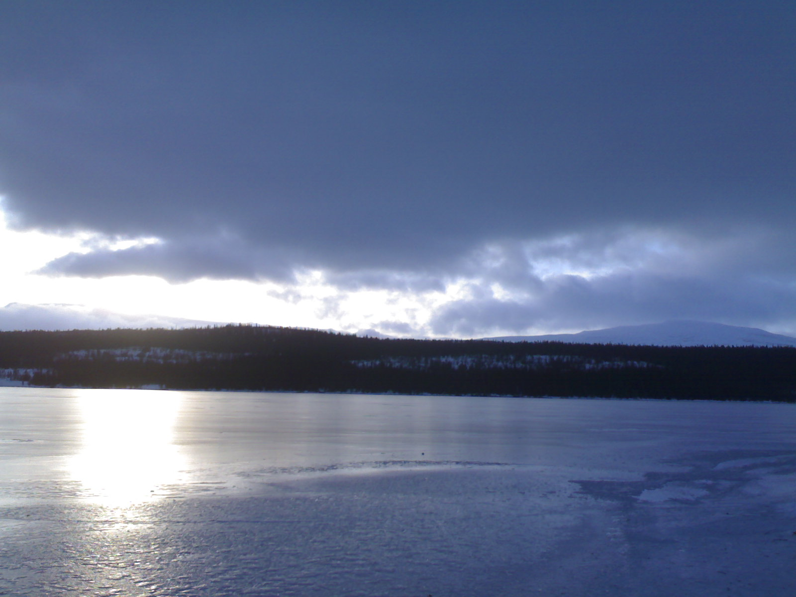 Lake Messlingen in Härjedalen, Sweden.